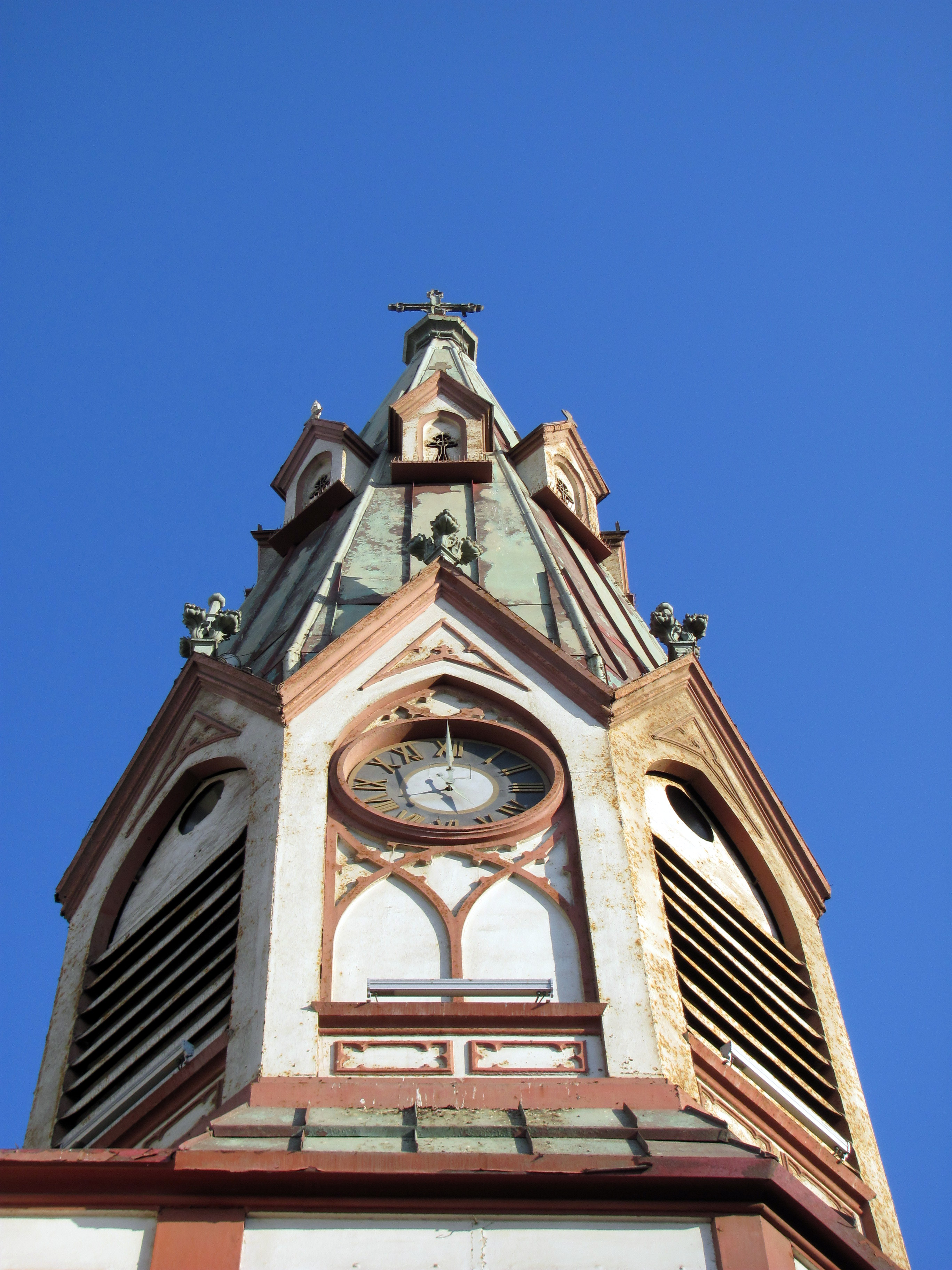 Catedral de San Marcos This is a photo of a national monument in Chile: 522